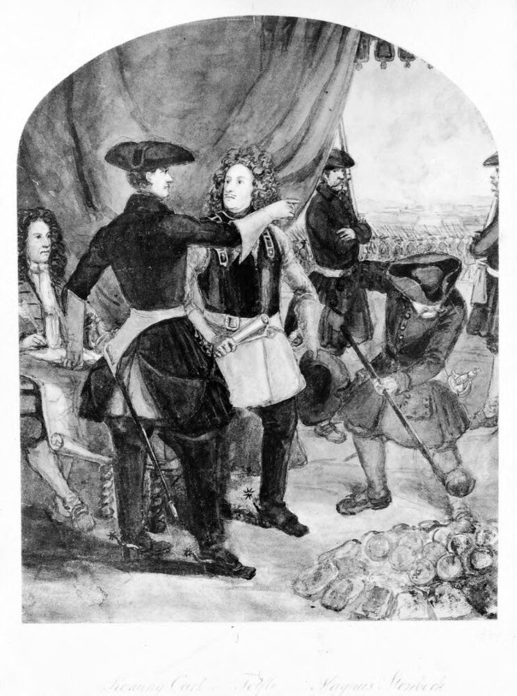 Karl XII och Magnus Stenbock vid Thorns belägring. Teckning av Alexander Wetterling.